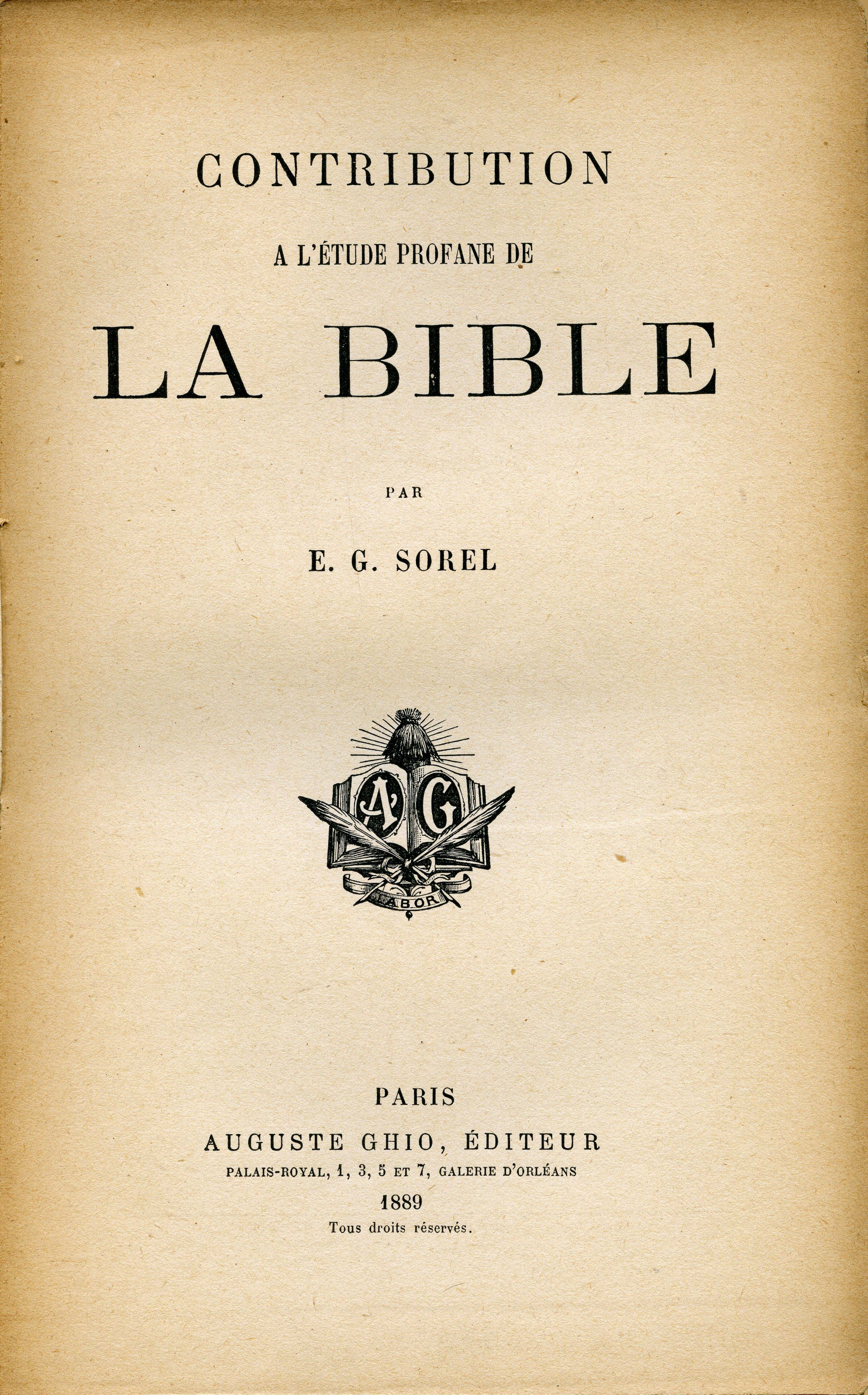 page de titre de l'édition originale